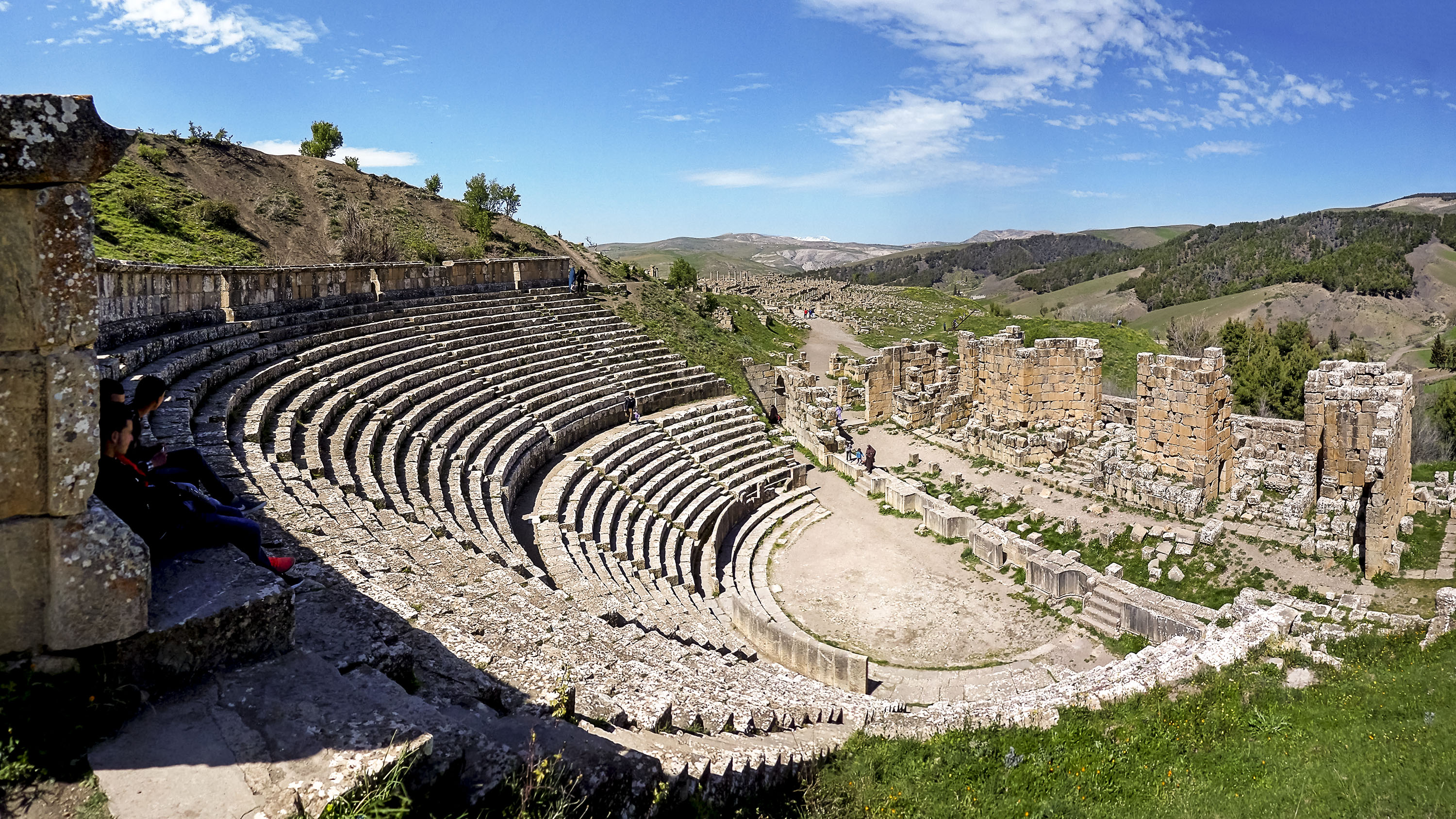 Theatre - Djemila (Cuicul) جميلة - سطيف Djemila, wilaya de Setif جميلة، ولاية سطيف